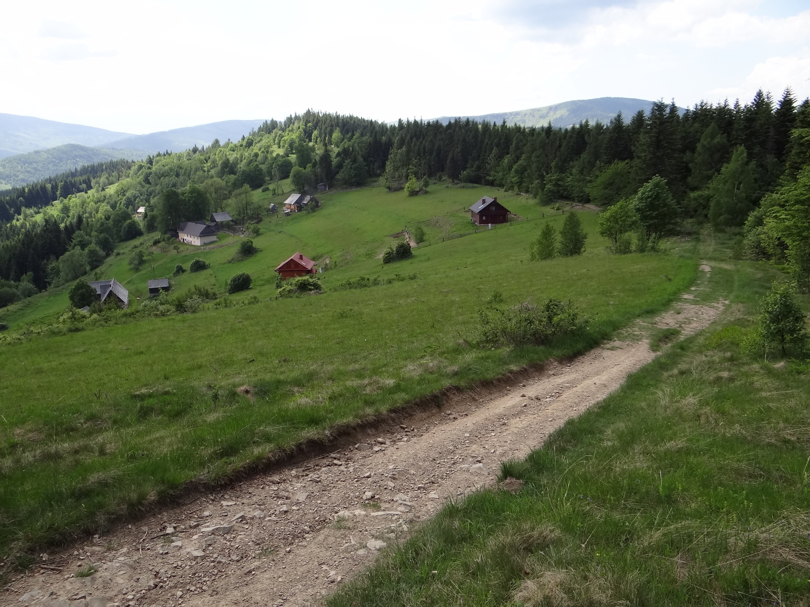 Osiedla Zawoi i szczyt Solnisko w Paśmie Przedbabiogórskim (Jałowieckim)